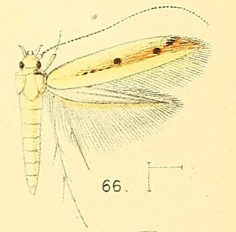 Acrocercops punctulata